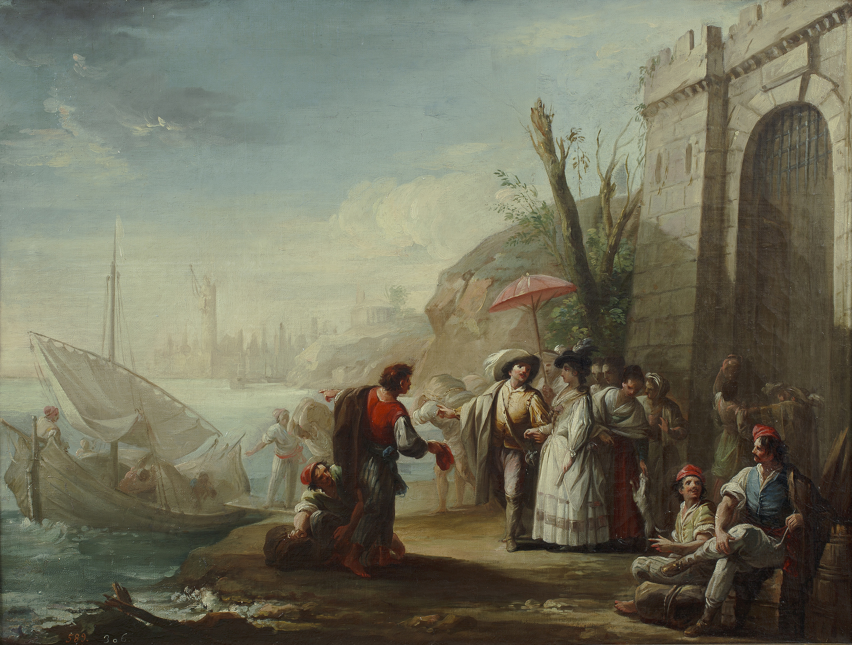 La obra representa a un grupo de personas disponiéndose a embarcar en un bote.